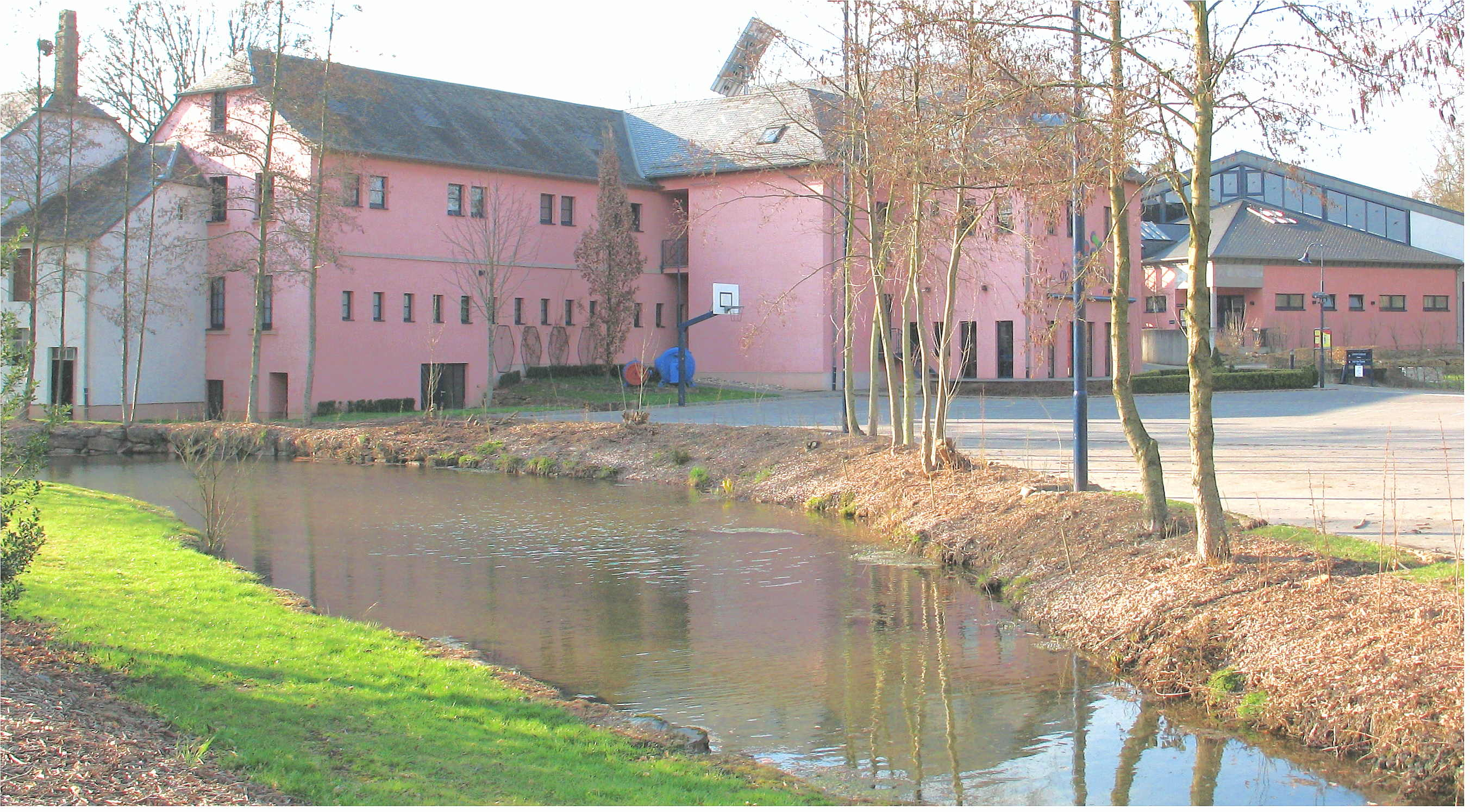 Op der Fabrik am Préizerdaul.